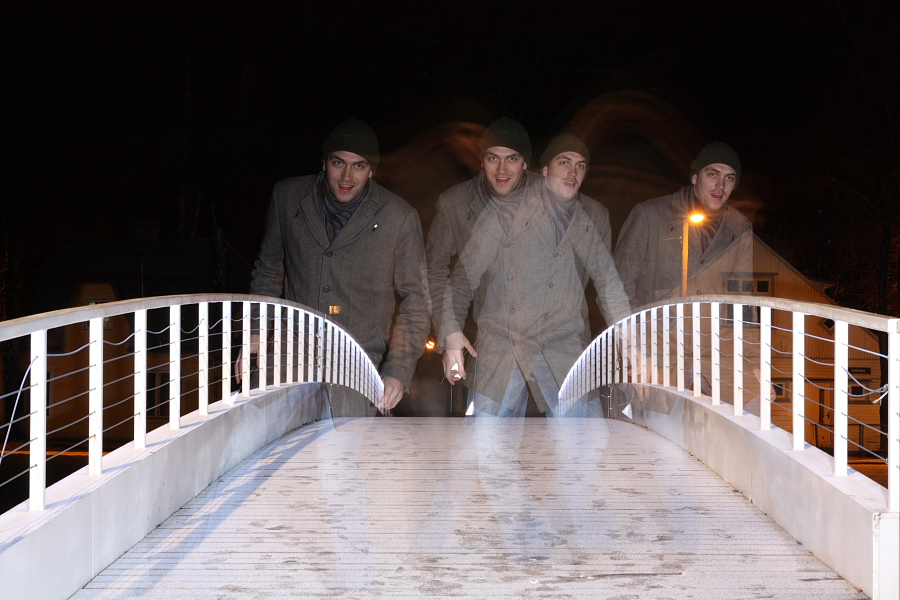 Olev Mihkelmaa